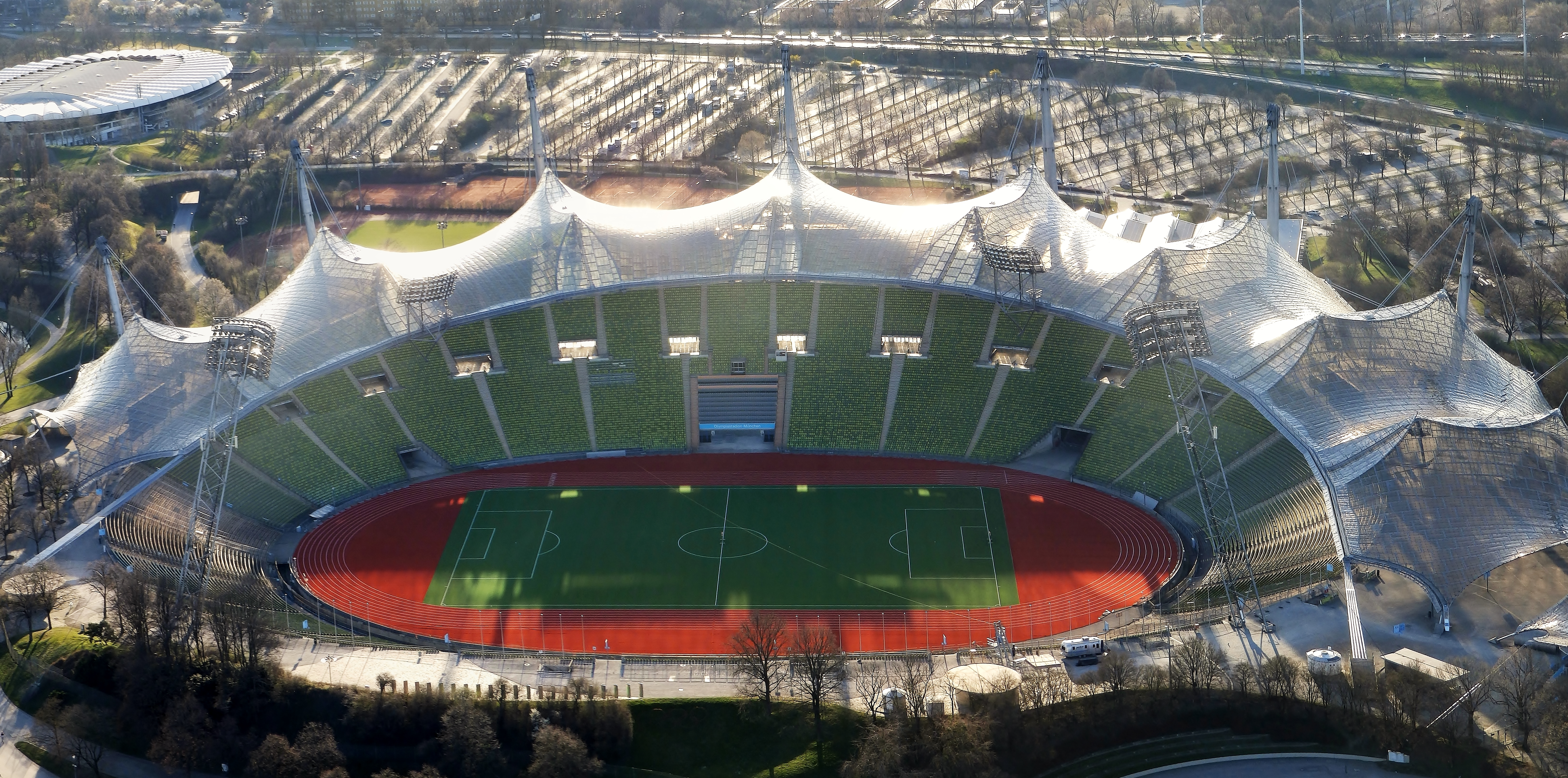 Teil des Münchner Olympiastadions